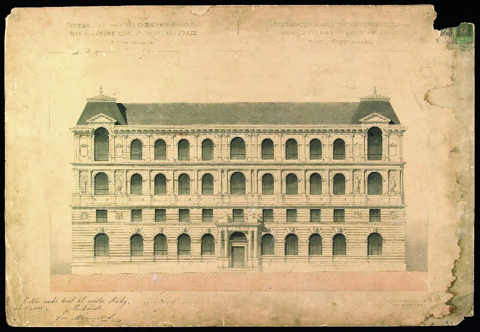 Projekt na stavbu Uměleckoprůmyslové školy v Praze